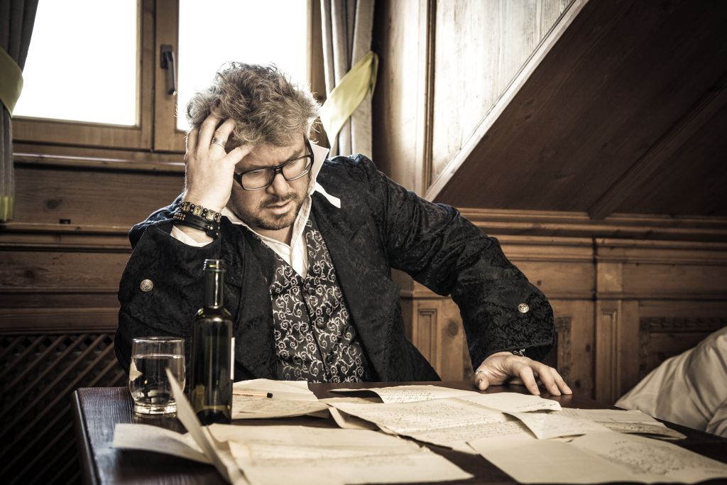 Das Bild zeigt mich (Moses Wolff) beim arbeiten an einem alten Schreibtisch.